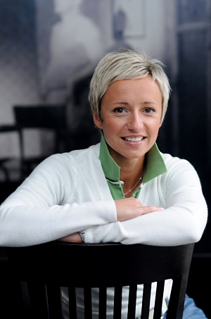 Jana Holcová (nar. 1975) je česká herečka.